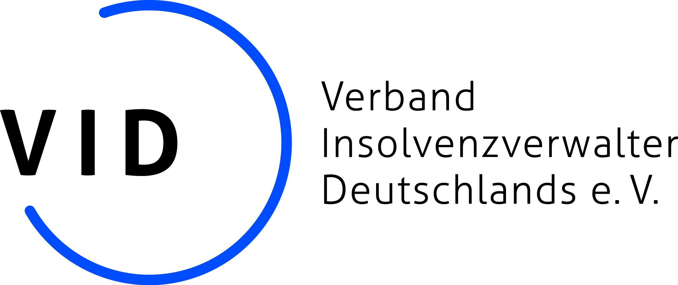 Dies ist das Logo des Berufsverbandes der deutschen Insolvenzverwalter, VID.